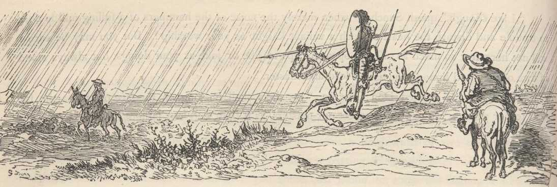 Dom Quixote avista o elmo de Mambrino e ataca o seu portador